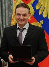 Артист цирка Аскольд Запашный на церемонии вручения Государственных наград и званий в Кремле 28 мая 2014 года.